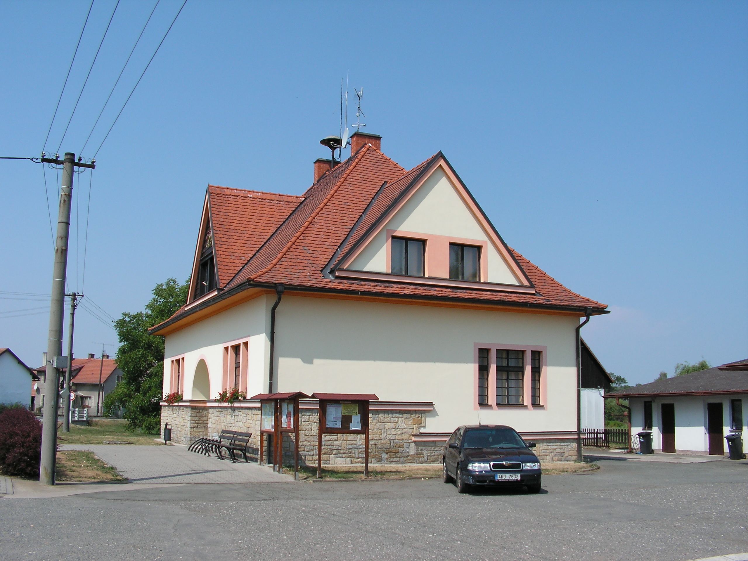 Budova obecního úřadu v Semechnicích